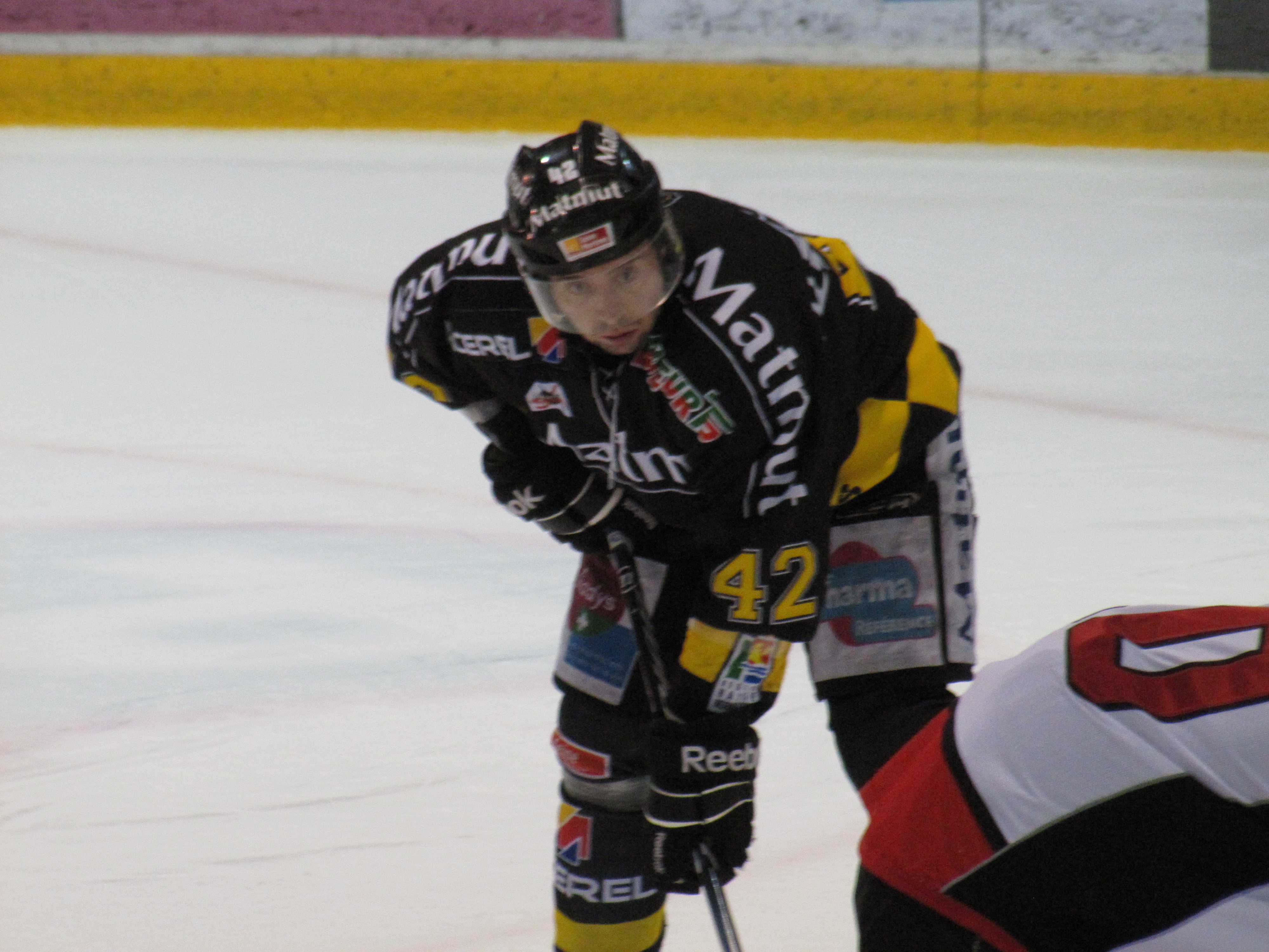 Julien Desrosiers lors de la Coupe Continentale de hockey 2012 à Rouen